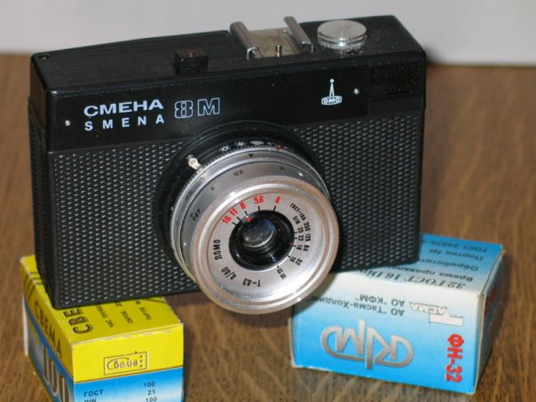 Смена 8М поздних выпусков (полностью черный корпус)